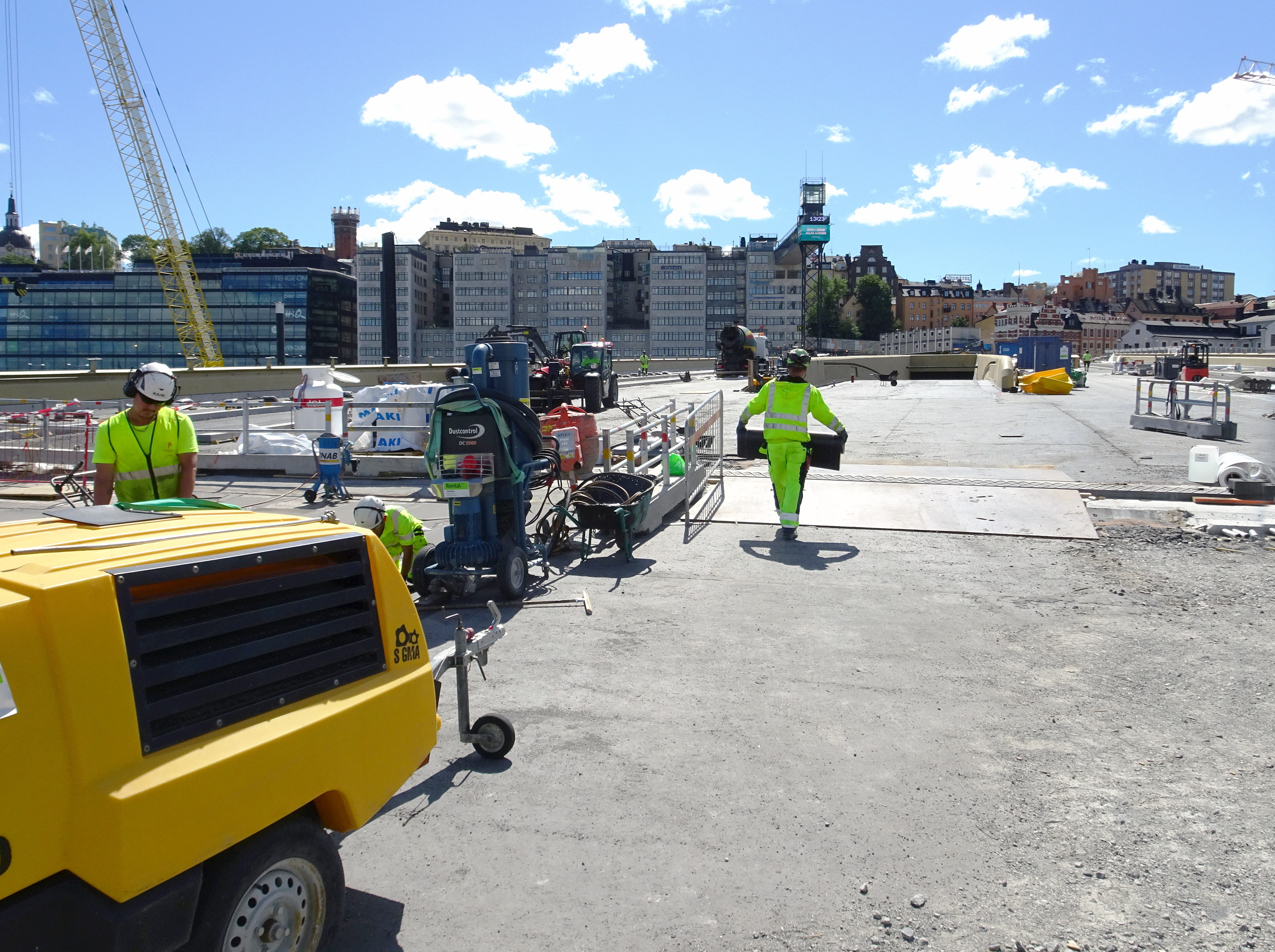 Nya Slussbron (Guldbron), vy mot Södermalm